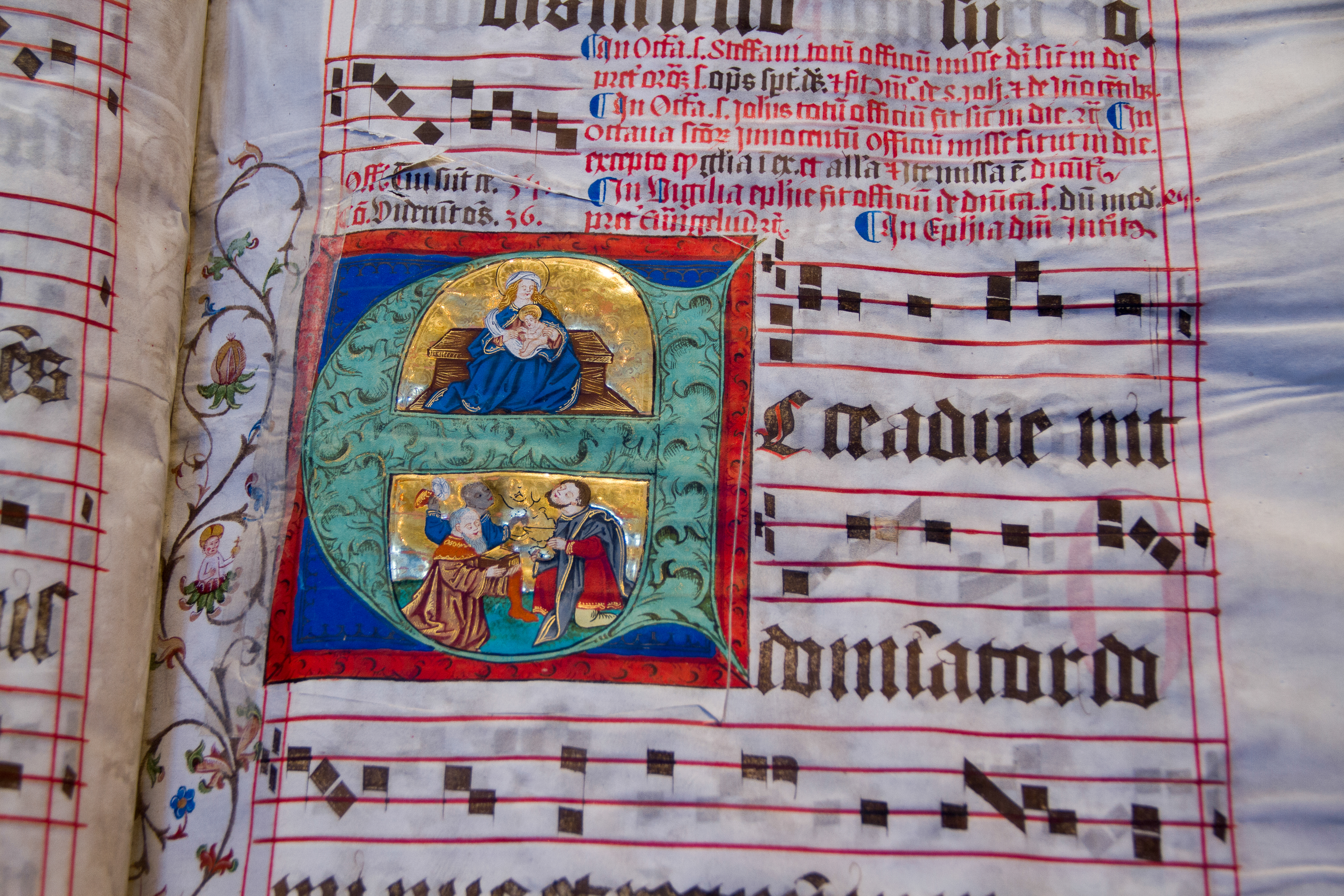 Graduel du couvent des clarisses d'Alspach (Haut-Rhin), 15e siècle (Ms 100). Lettrine E enluminée. Compartiment du haut : Vierge à l'Enfant assise sur une cathèdre. Dans le bas : Adoration des rois mages. Bibliothèque du Grand Séminaire de Strasbourg. Conservateur : Louis Schlaefli.